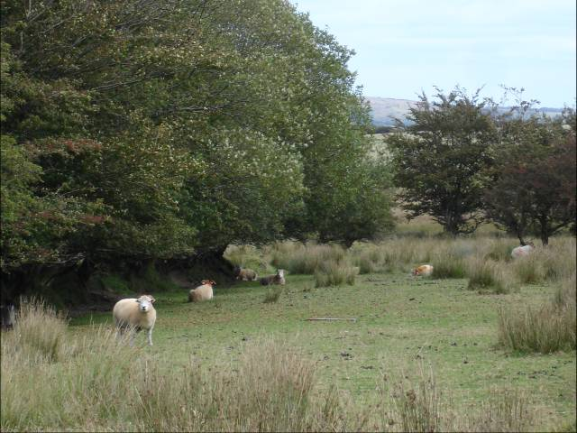 Exmoor Horn